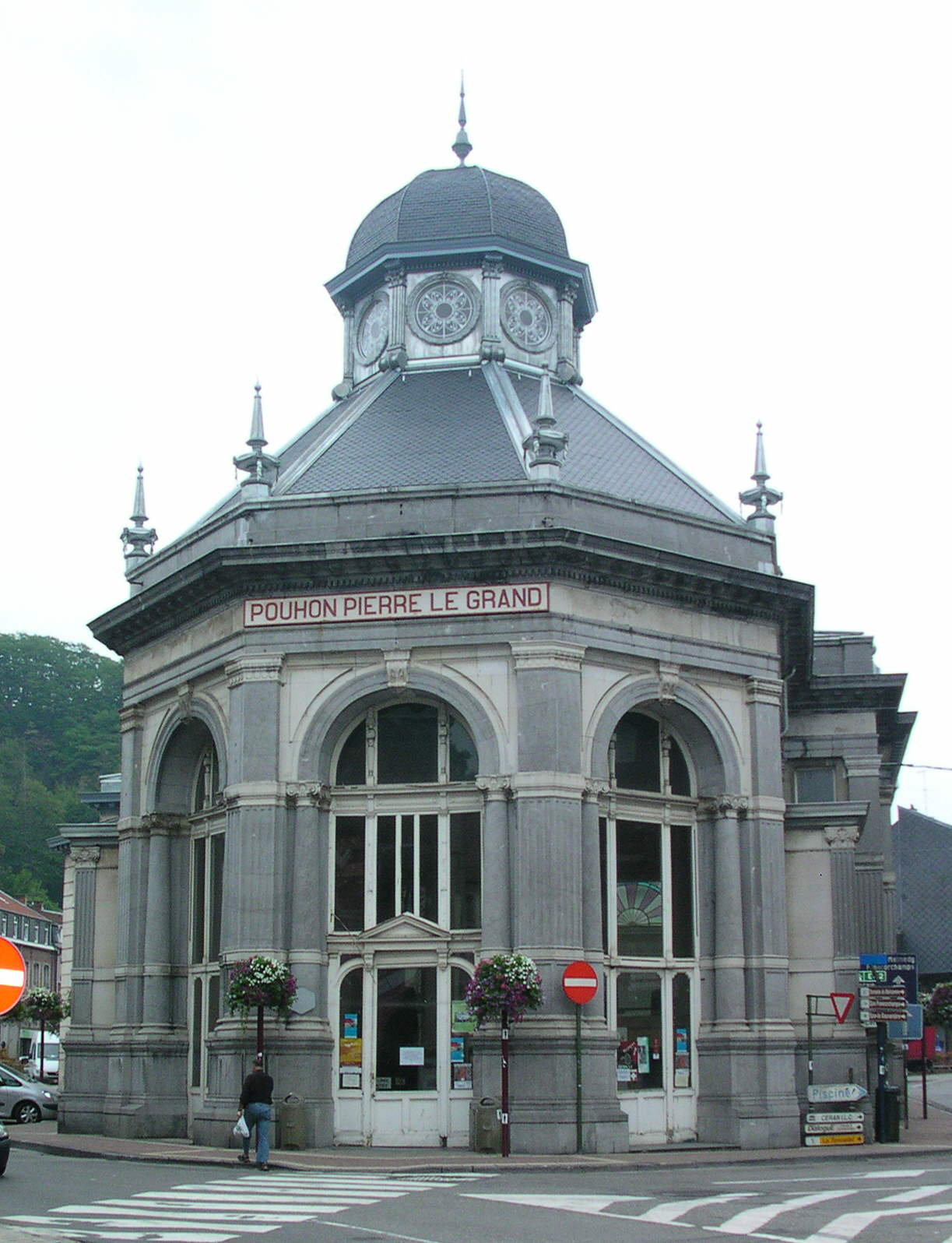 Spa (Belgique), Pouhon Pierre-Le-Grand, Brunnen "Pouhon" Pierre le Grand" (der Name bezieht sich auf Zar Peter den Großen)